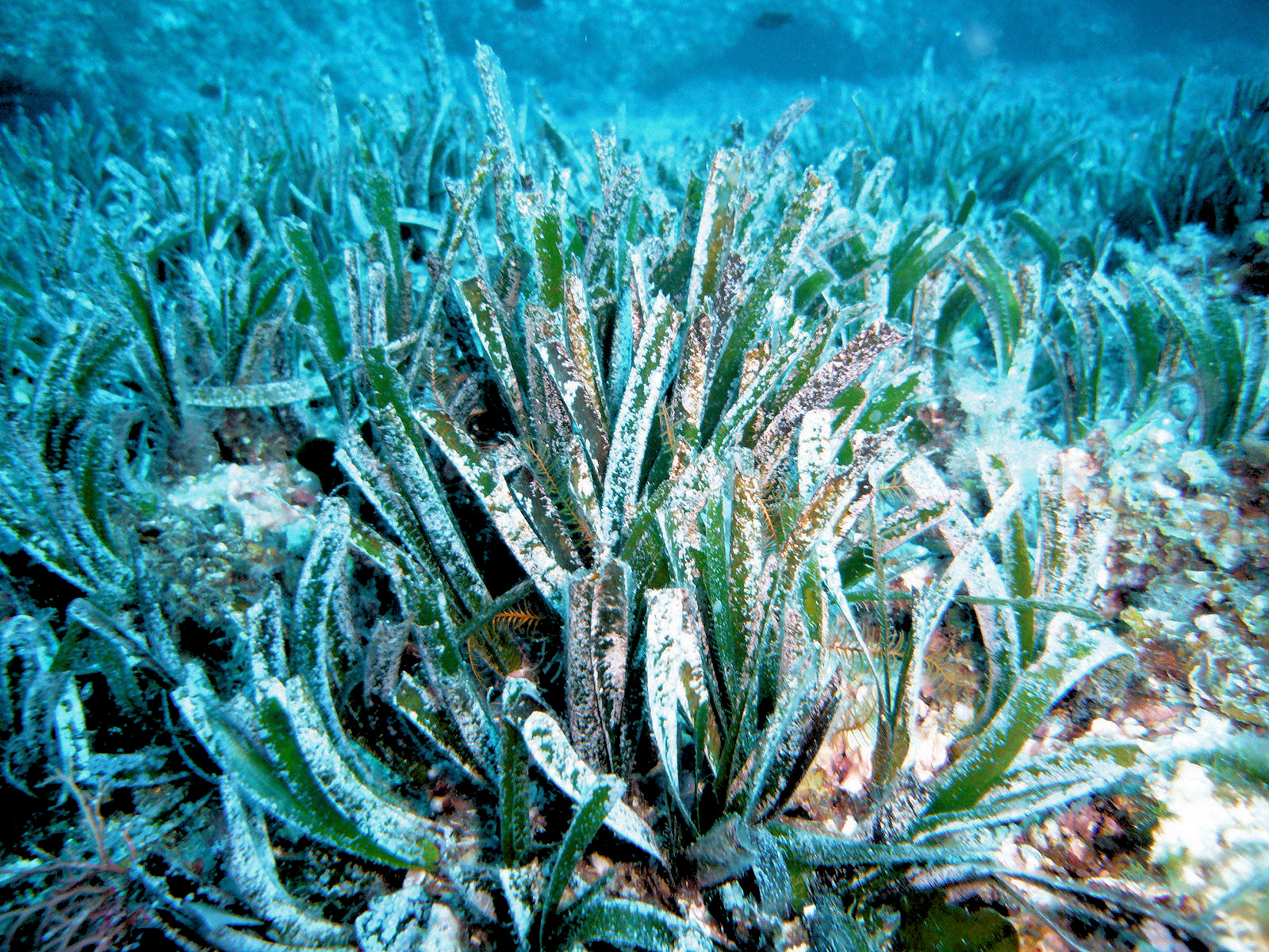 Posidonia oceanica, diving in Portofino, Italy